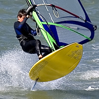 Planche de funboard actuelle Photo issue de ma banque d'images personnelle : Pep.per